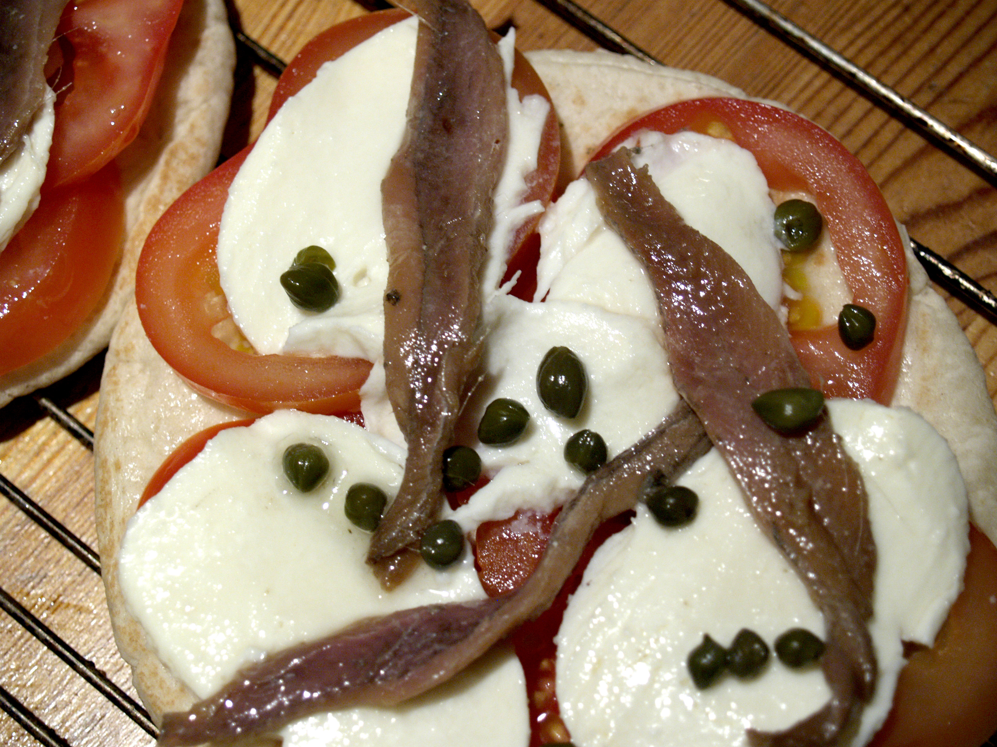 Pizza med ansjoser og kapers